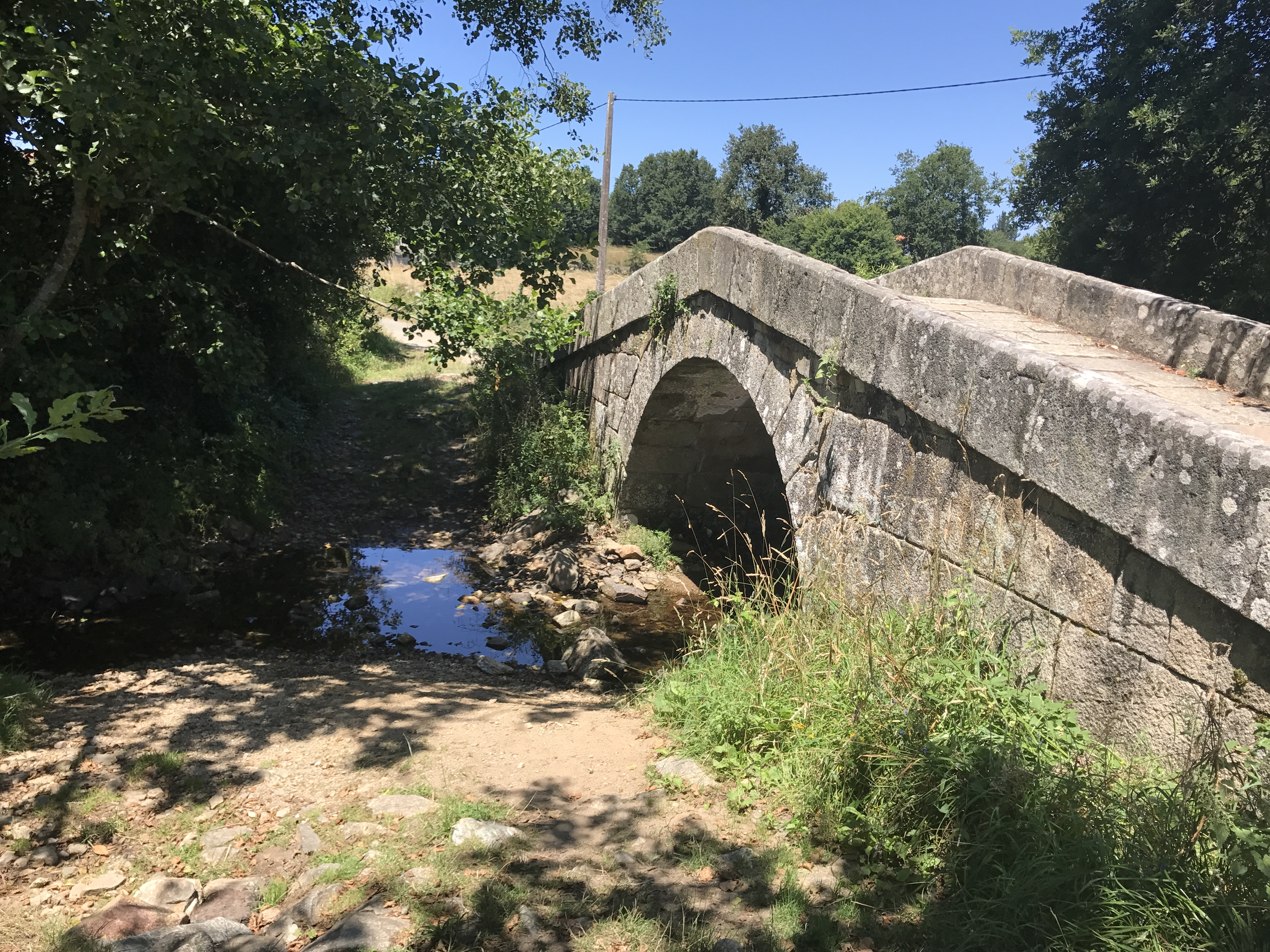 Ponte sobre o río seco. Leboreiro.